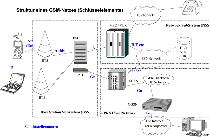 GSM Netzwerk, aus übernommen und übersetzt Übersetzung: Mwka